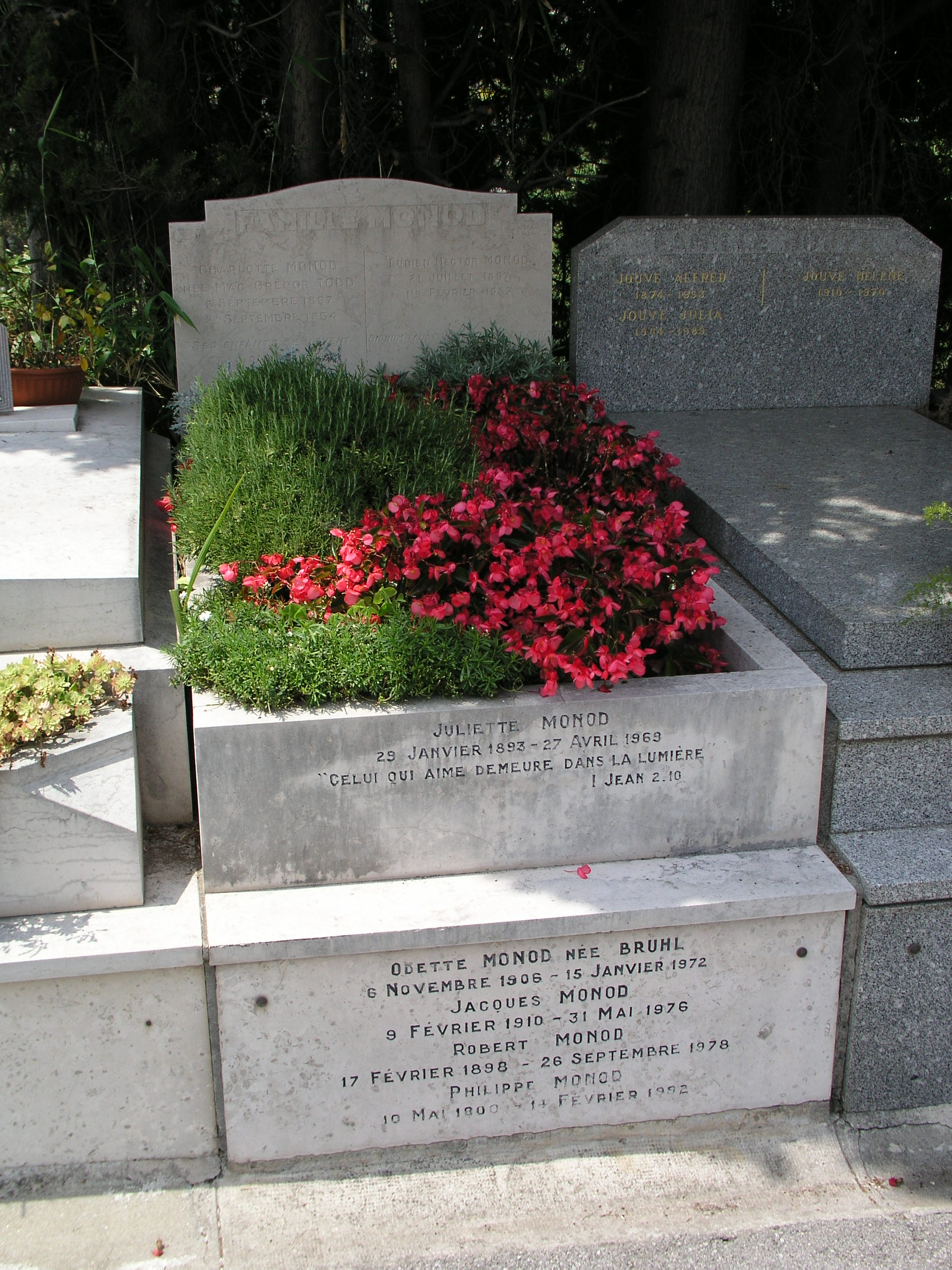 Monod, Jacques & Monod, née Bruhl, Odette, Le Grand Jas, Cannes